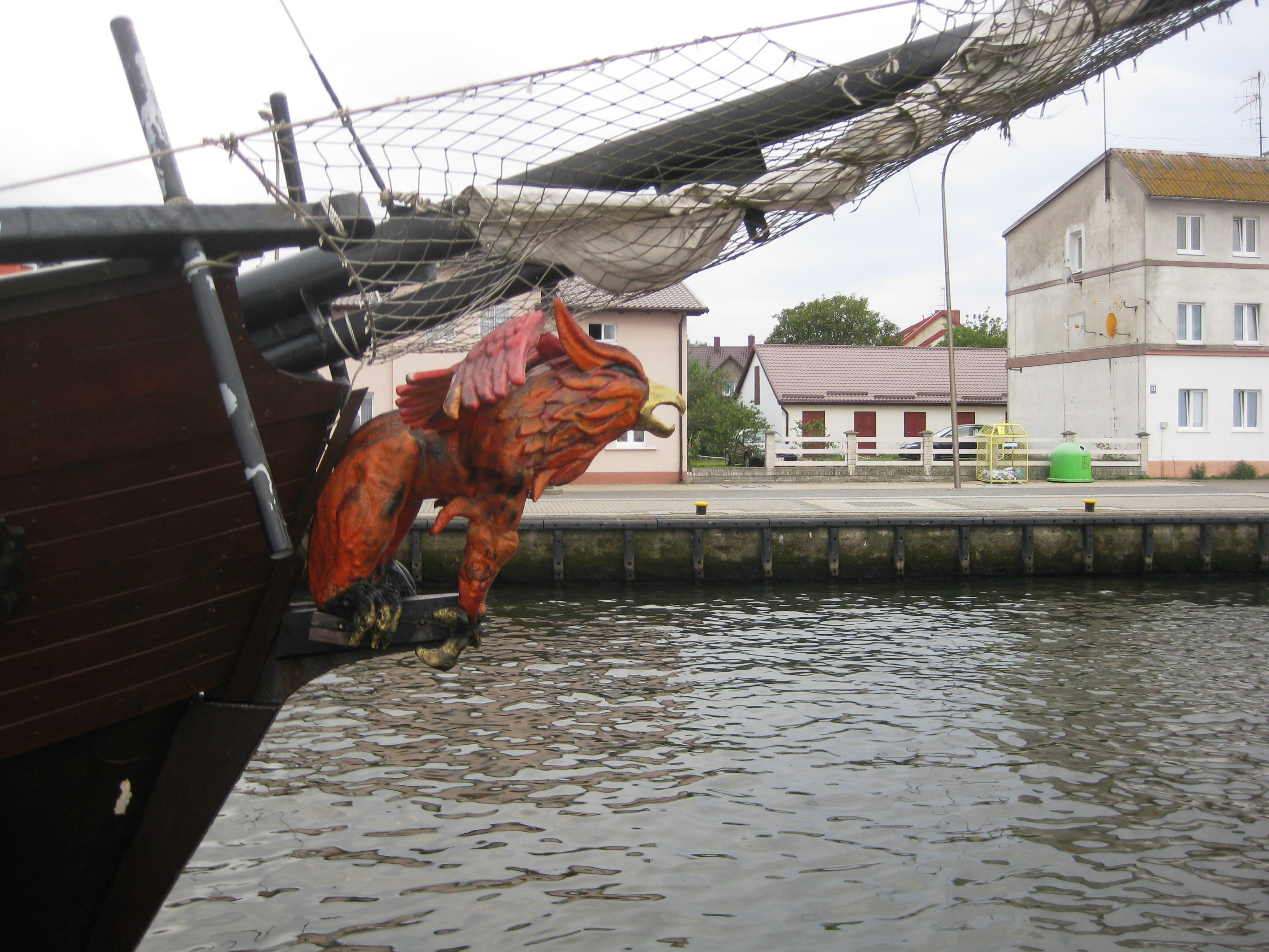 Darłówko - statek wycieczkowy